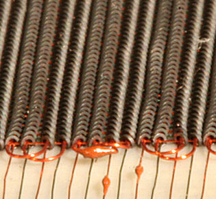 Ferritkernelager 16 kOrd fra CGC NOVA 1972